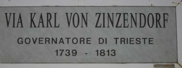 Targa della via dedicata a Karl von Zinzendorf, a Opicina (Trieste) Foto: AdlerTS, 2006